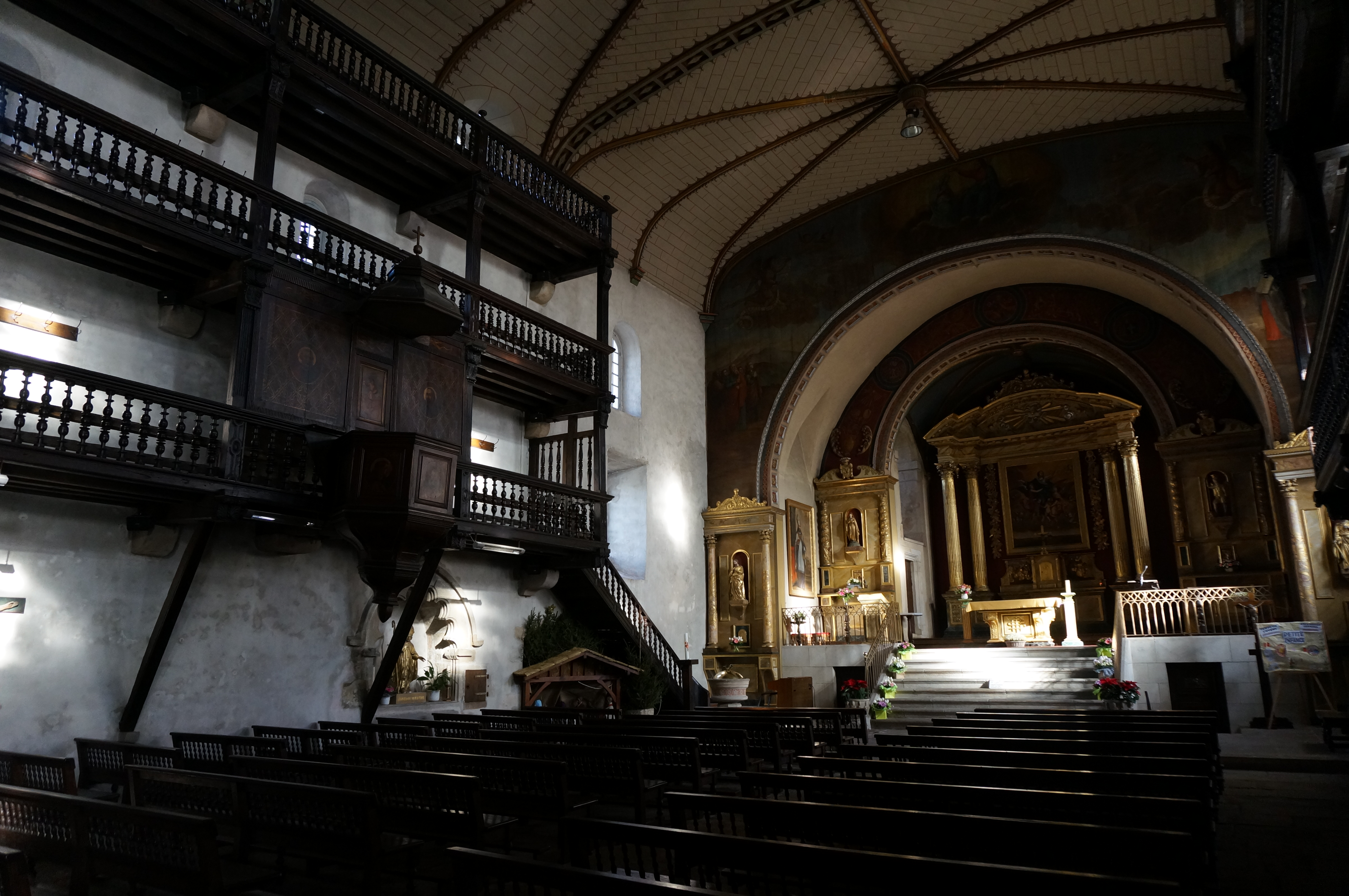 Eglise de Sare